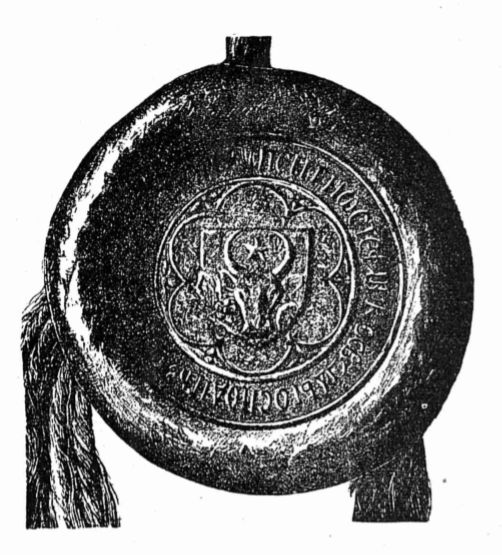 Pecetea lui Ștefan cel Mare 1457 - 1504